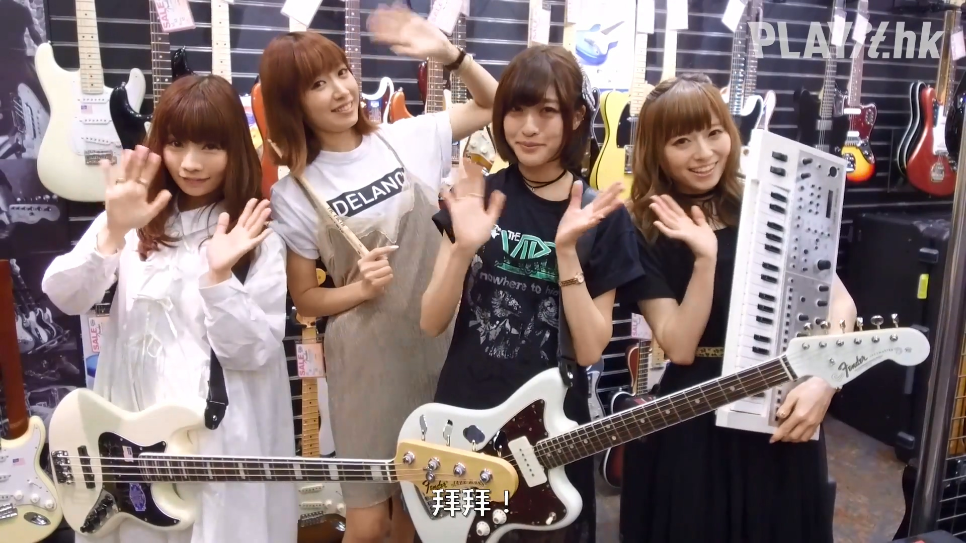 中文（香港）: Silent Siren給香港粉絲們的Message 2016 47s